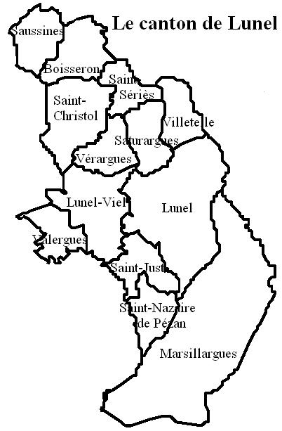 Le canton de Lunel Image personnelle